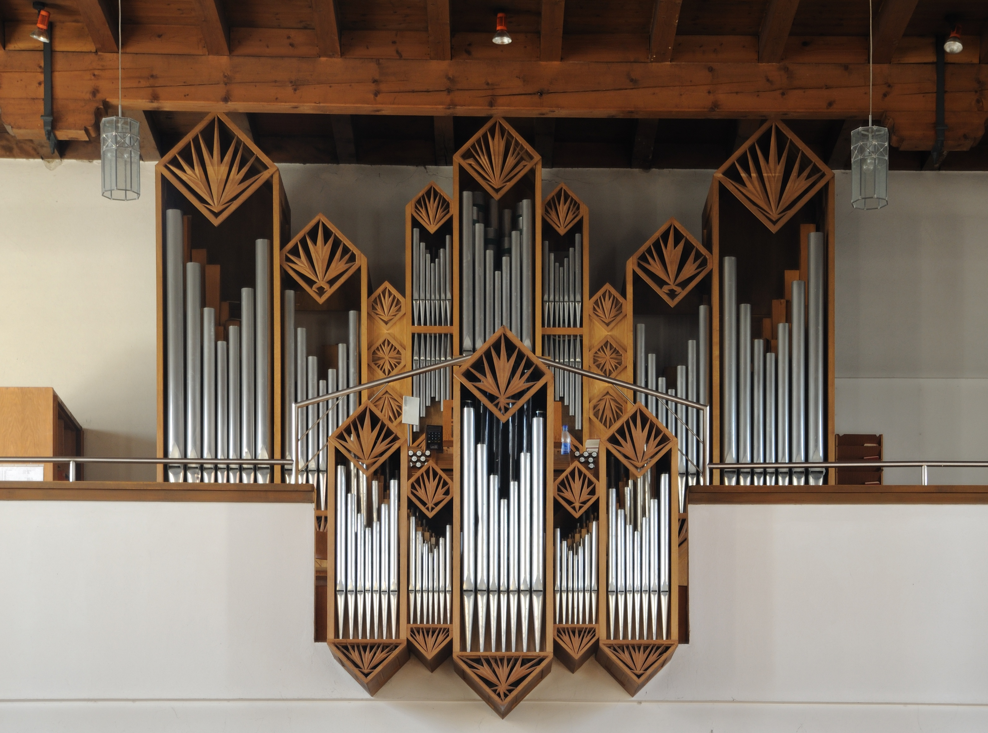 Weil am Rhein-Haltingen: St. Maria, Orgel